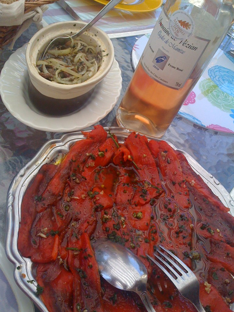 VDP des coteaux catalans et cuisine des Pyrénées-Orientales